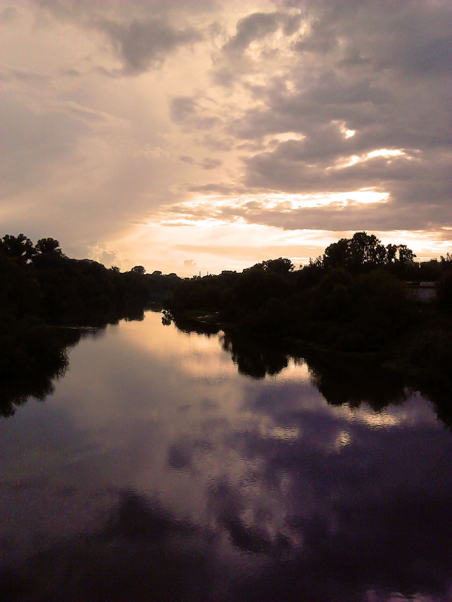 Вид на р. Клязьму с Парковского моста. г. Орехово-Зуево, сентябрь 2013